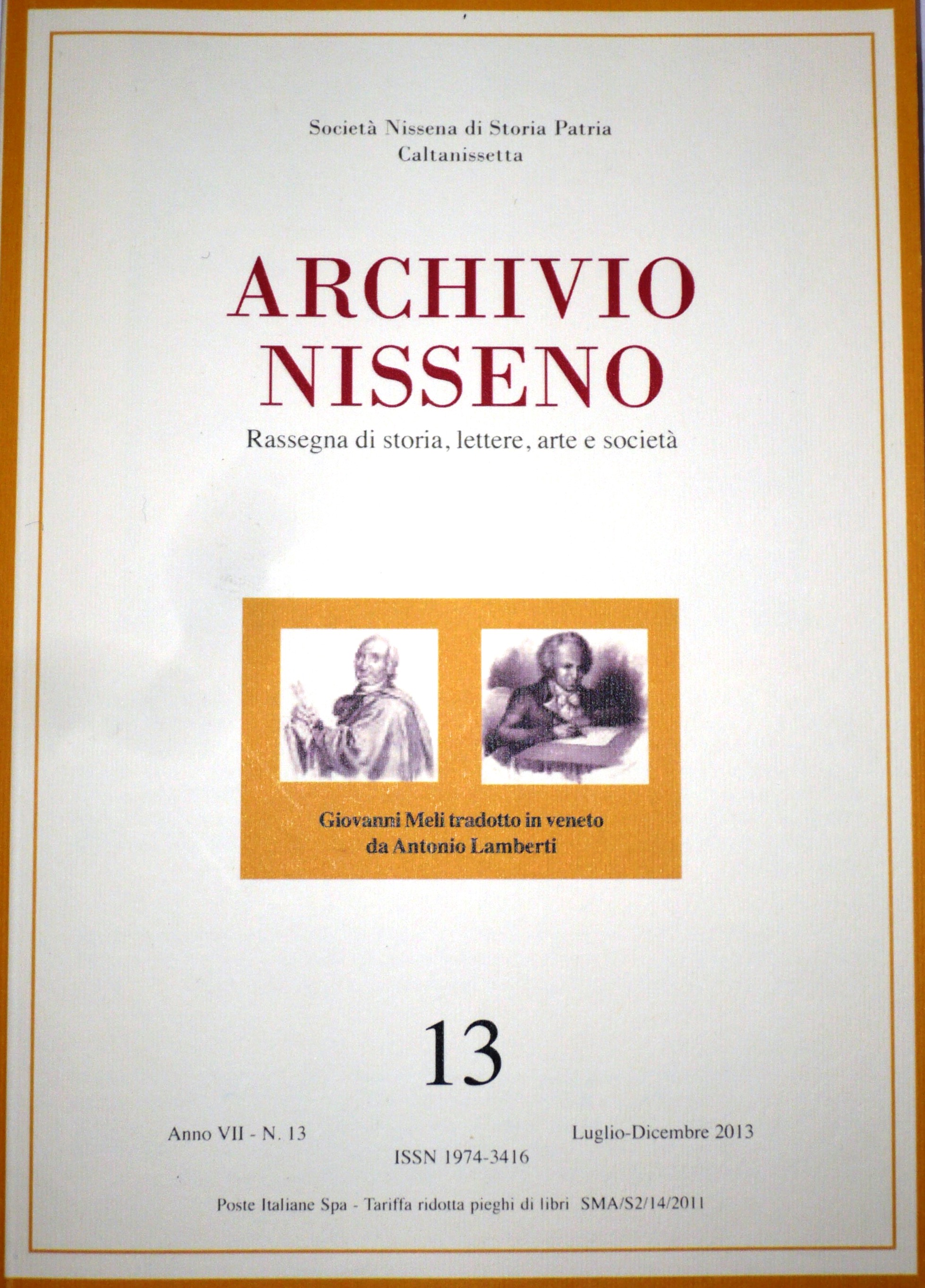 Cover della rivista Archivio Nisseno n. 13